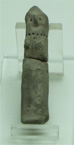 Terracota femenina (650 - 500 adC; I Edad del Hierro). Cabezo Morrudo (Fuentes de Ebro, Zaragoza). Museo de Zaragoza